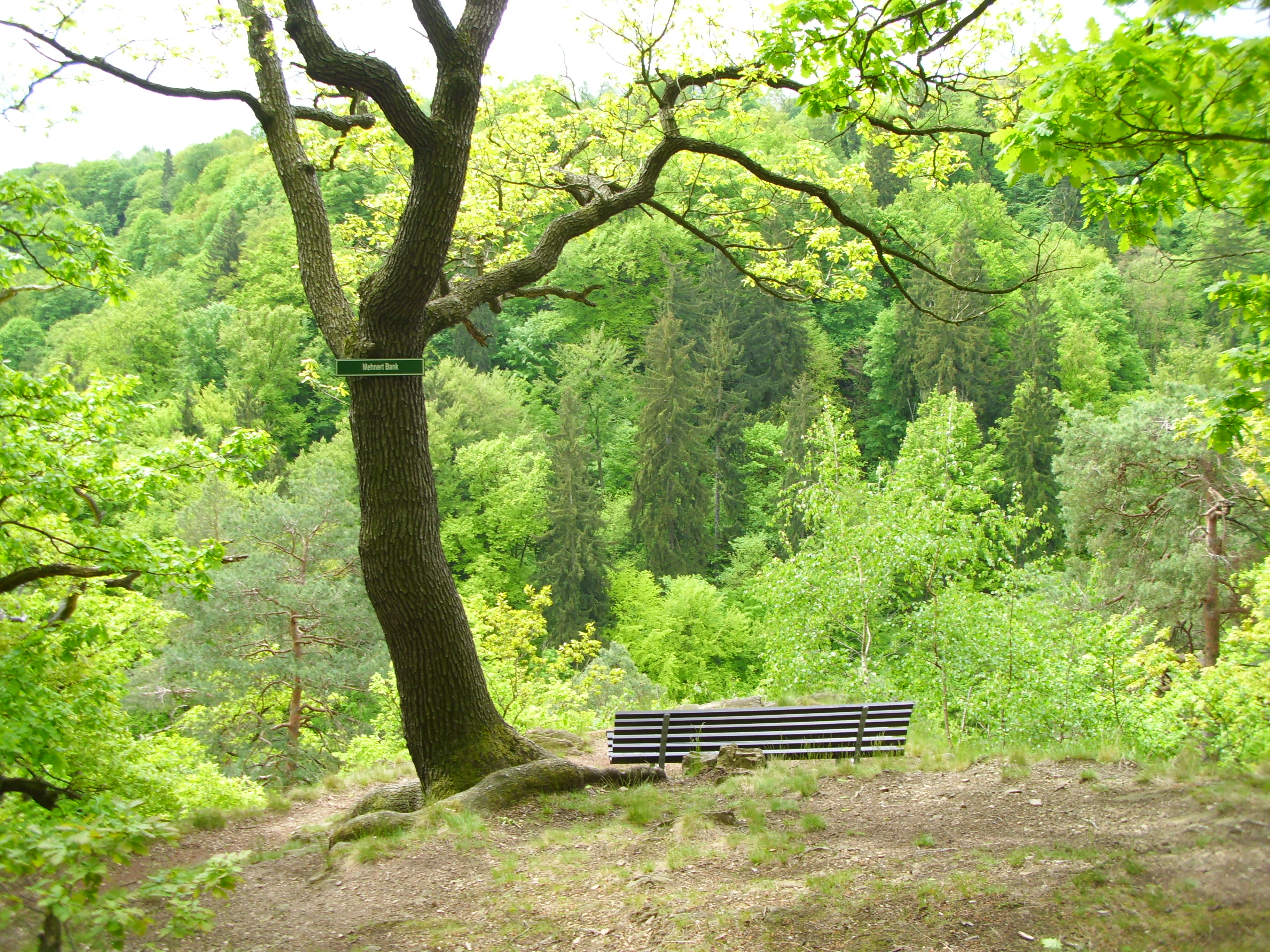 Mehnert-Bank am Sagenweg, mit Blick in den Rabenauer Grund.